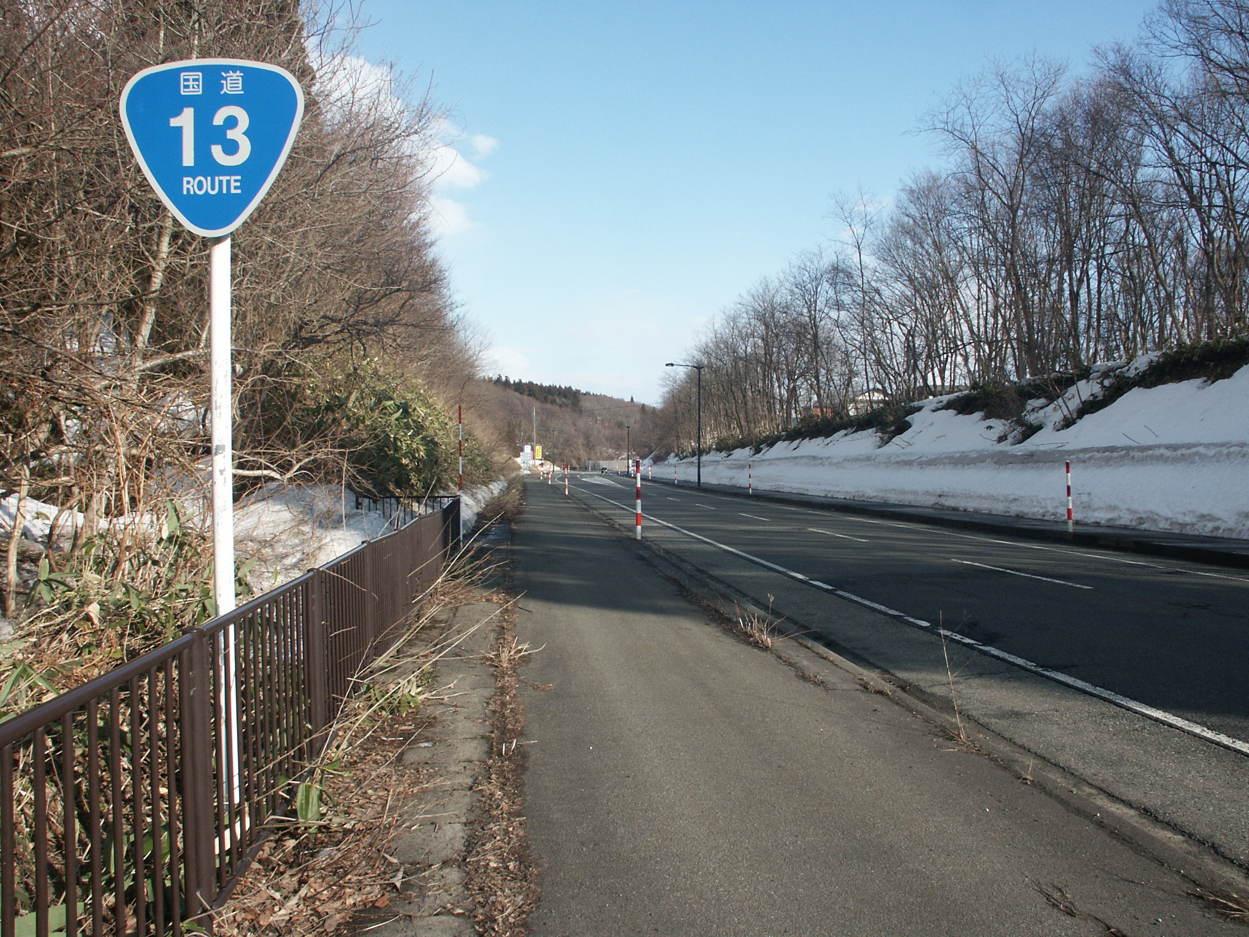 国道13号刈和野バイパス秋田県大仙市刈和野付近